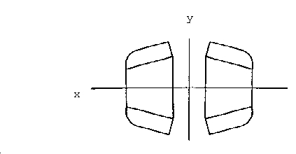 Seriaalne meetod. Geomeetrilise kujundi peegeldamine: x = horisontaaltelg, y = vertikaaltelg